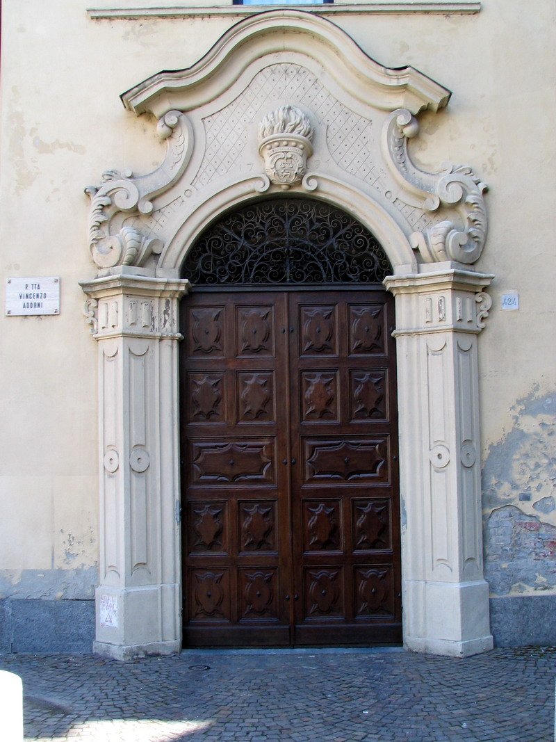 Asti, Portale dell'ex convento di Santa Caterina . Foto fatta da me faberh